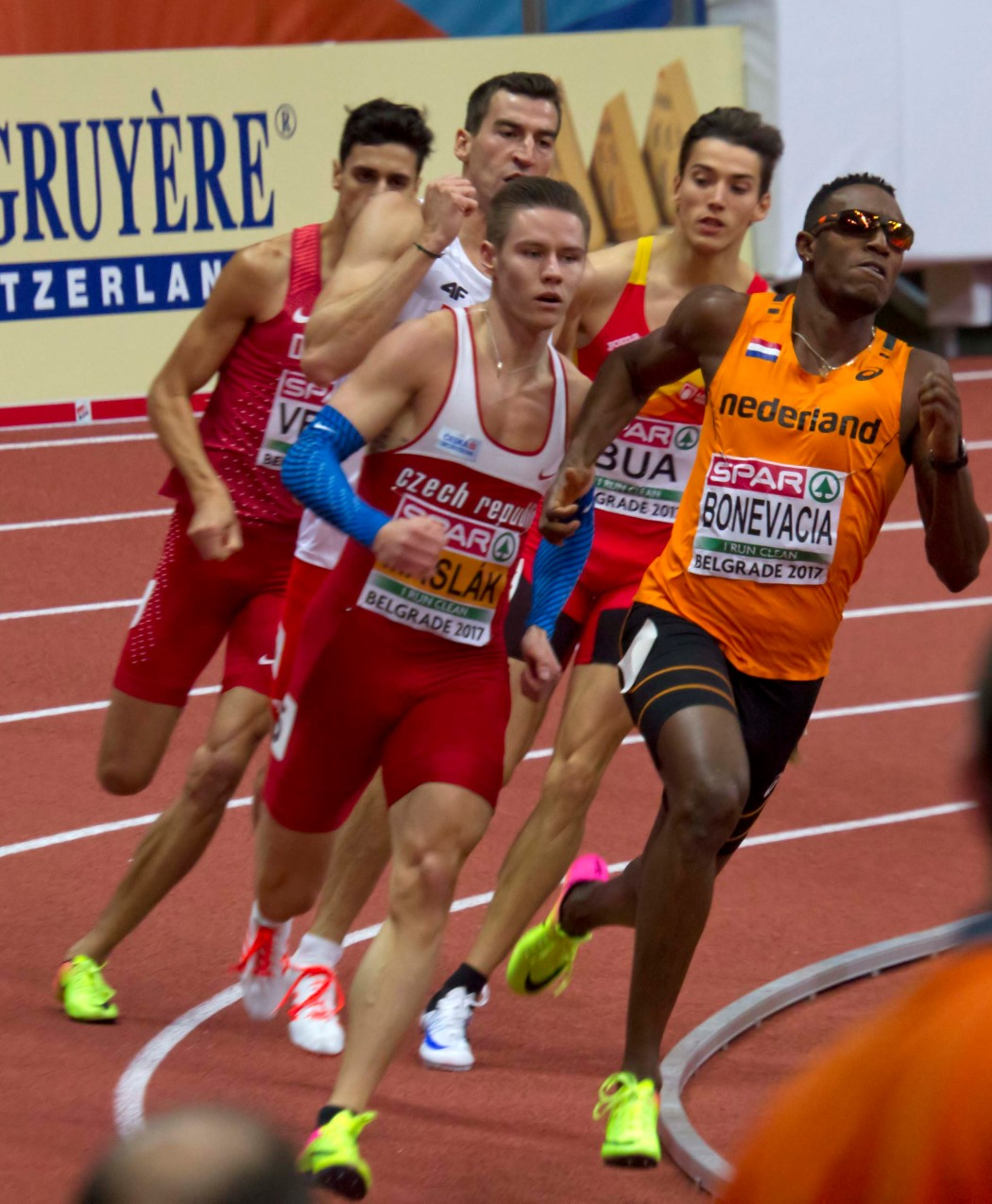 205 fin 400m man maslak bonevacia